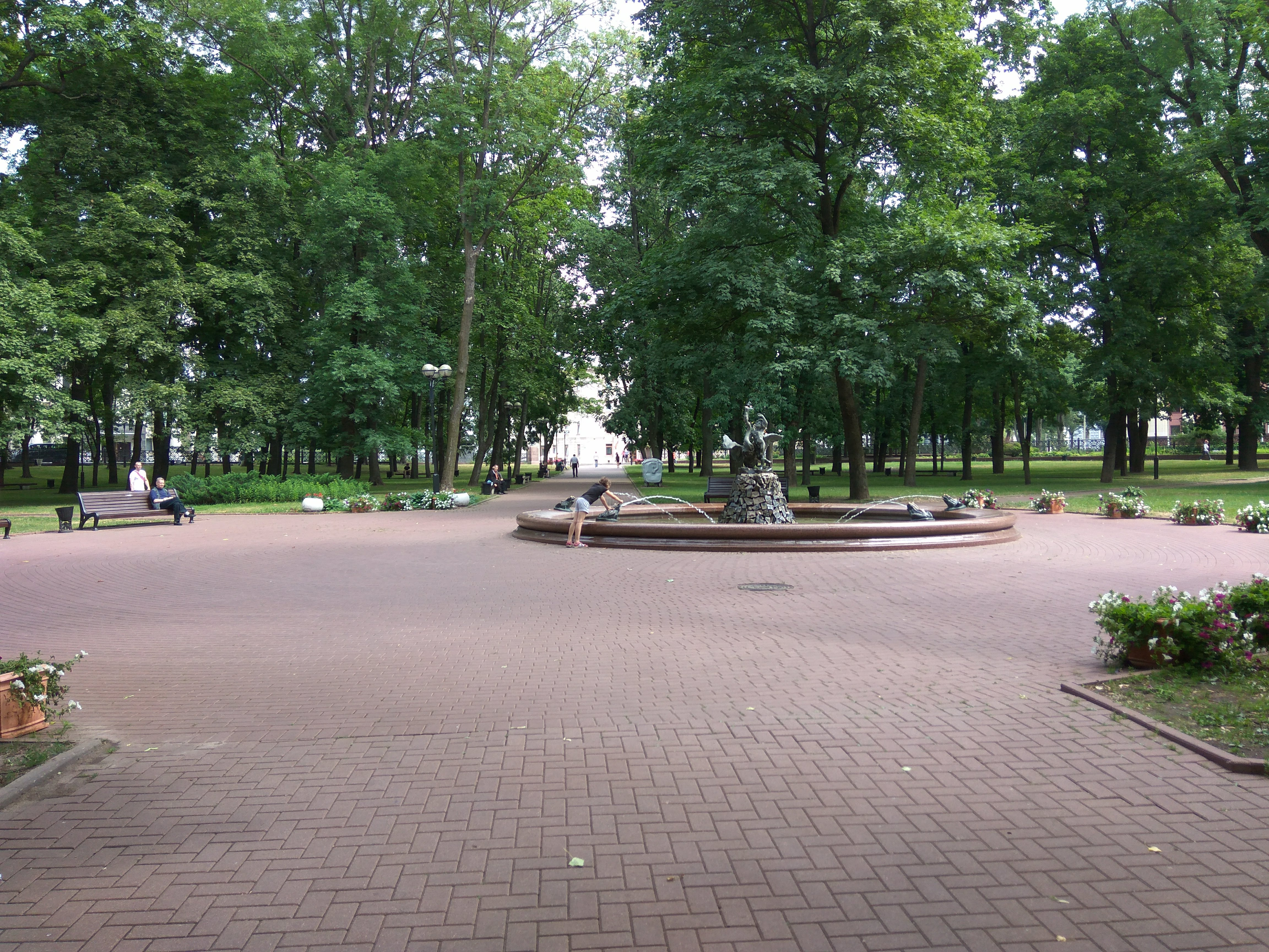 Мінск. Аляксандраўскі сквер. 2018